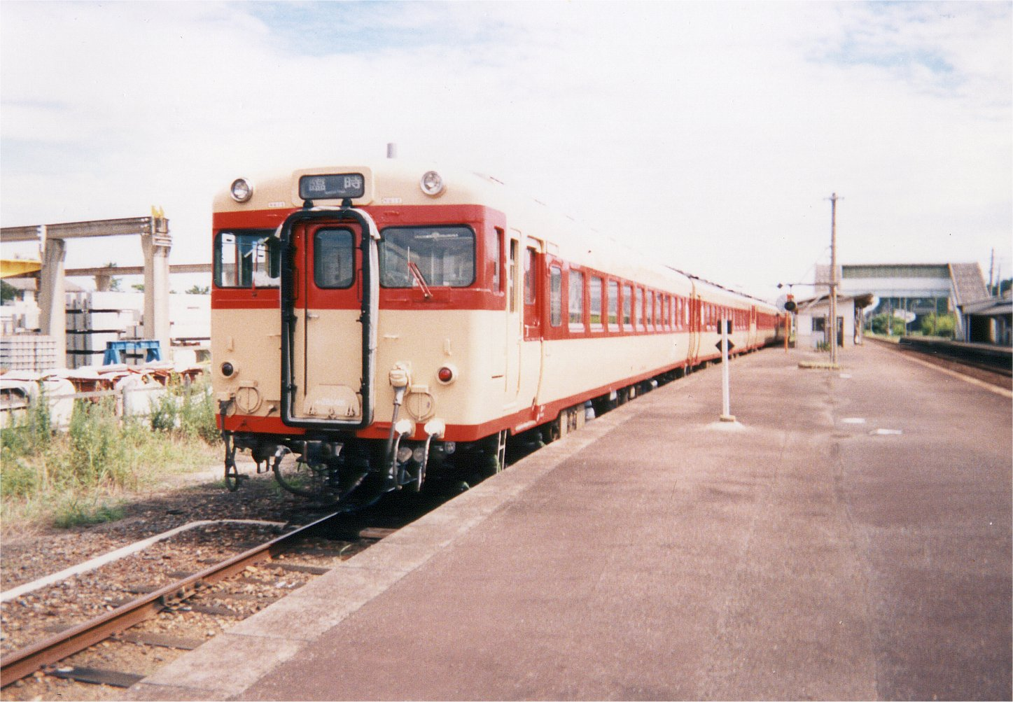 撮影日不明。都野津駅にて。